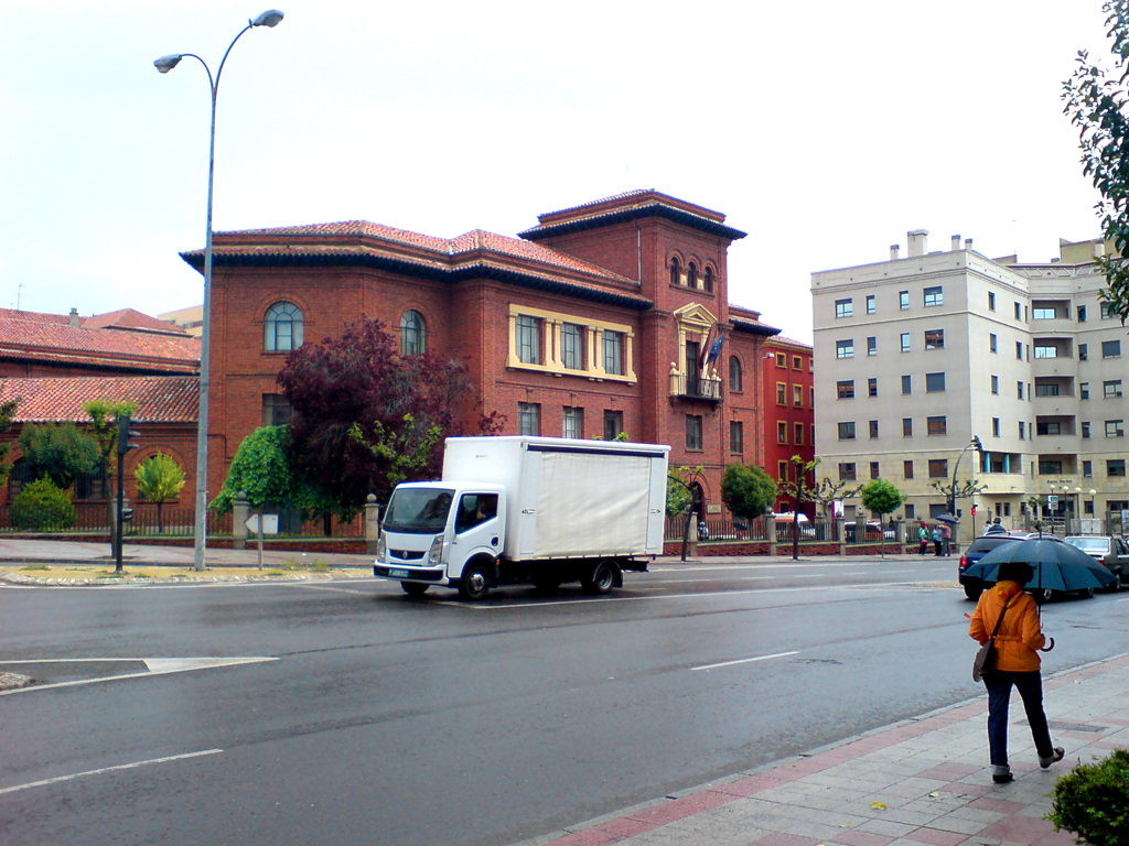 Instituto Sánchez Albornoz.